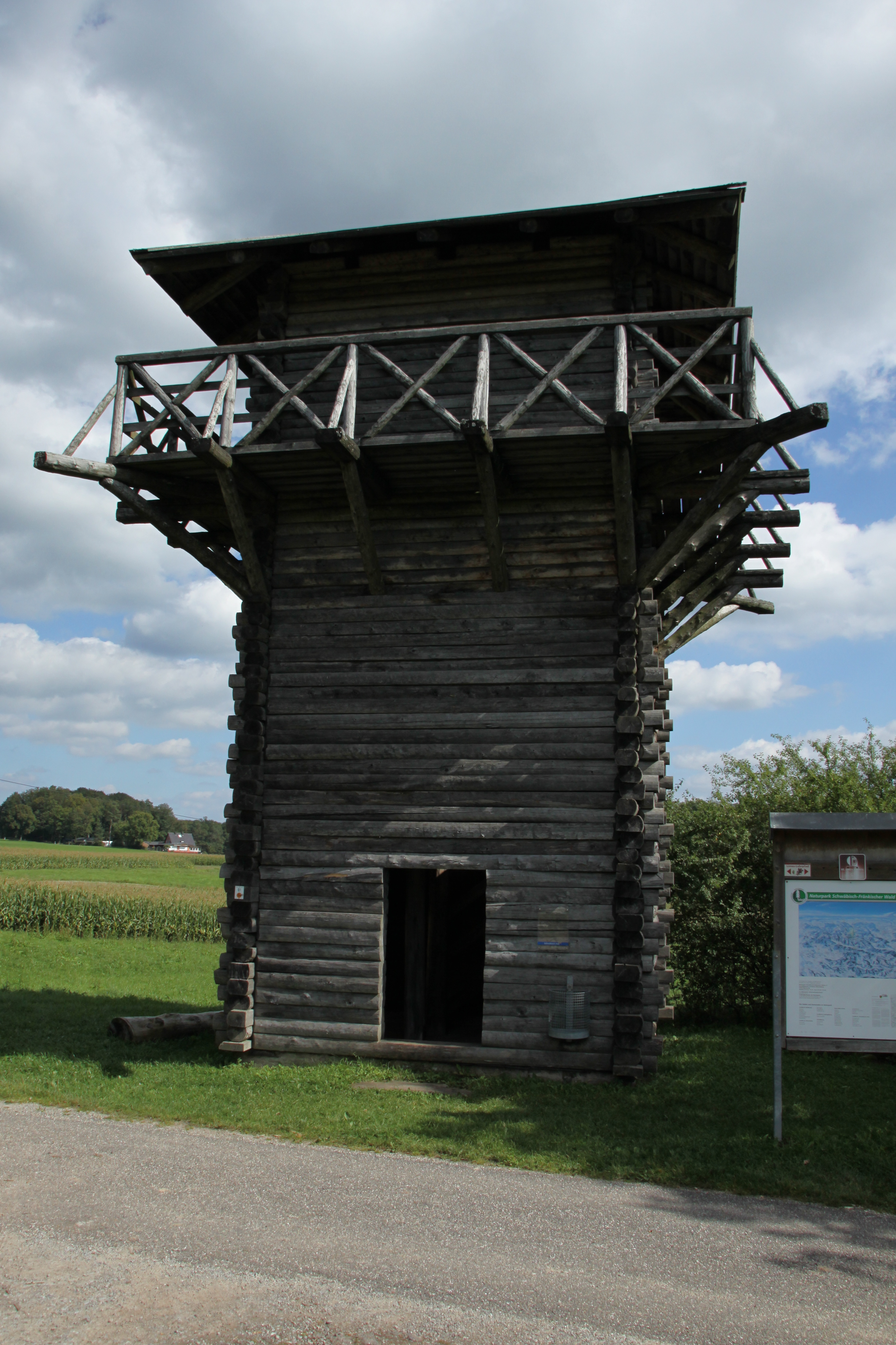 Mainhardt- falsch rekonstruierter römischer Wachturm